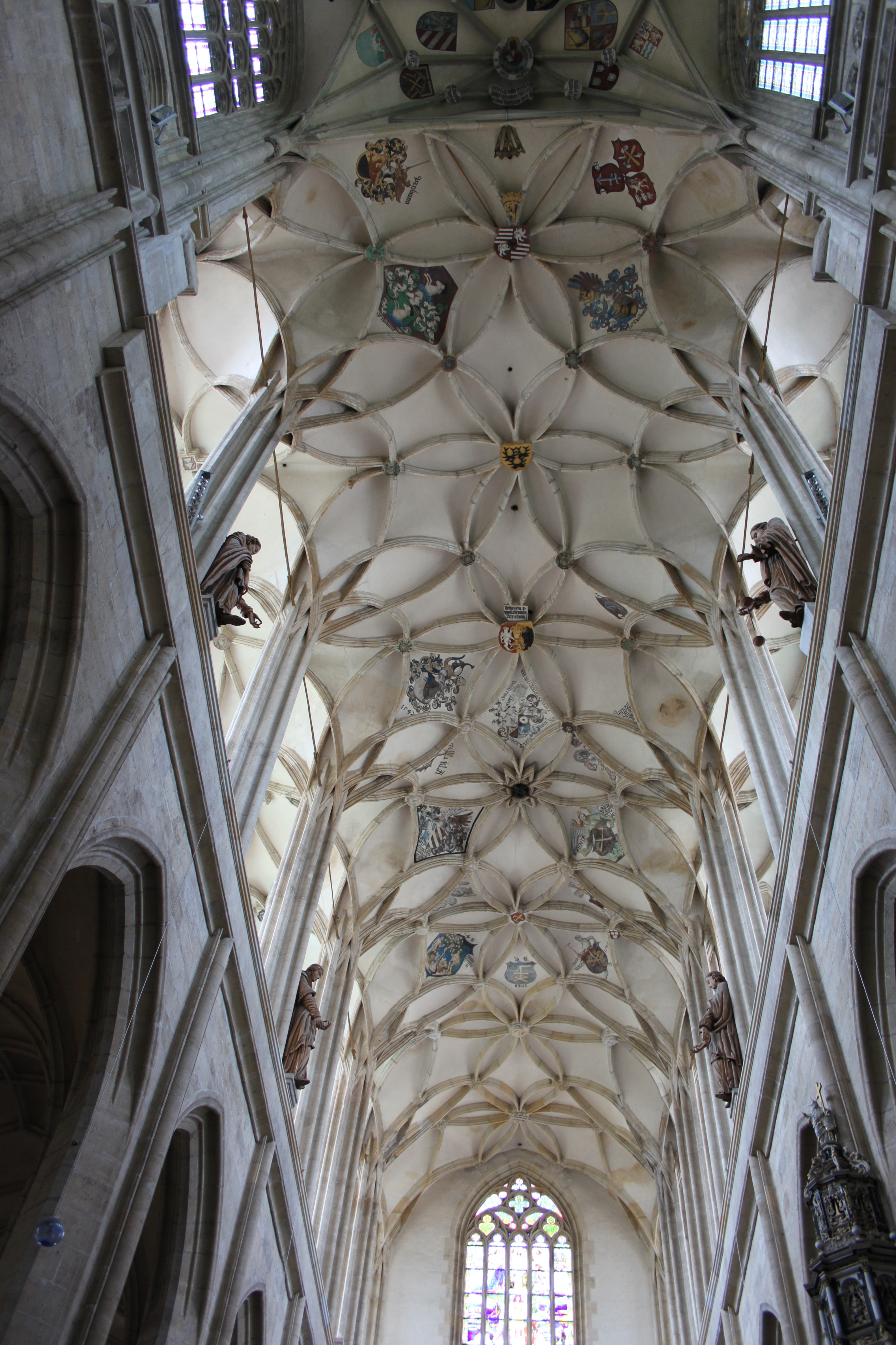 Kroužená klenba střední lodi chrámu sv. Barbory v Kutné Hoře.